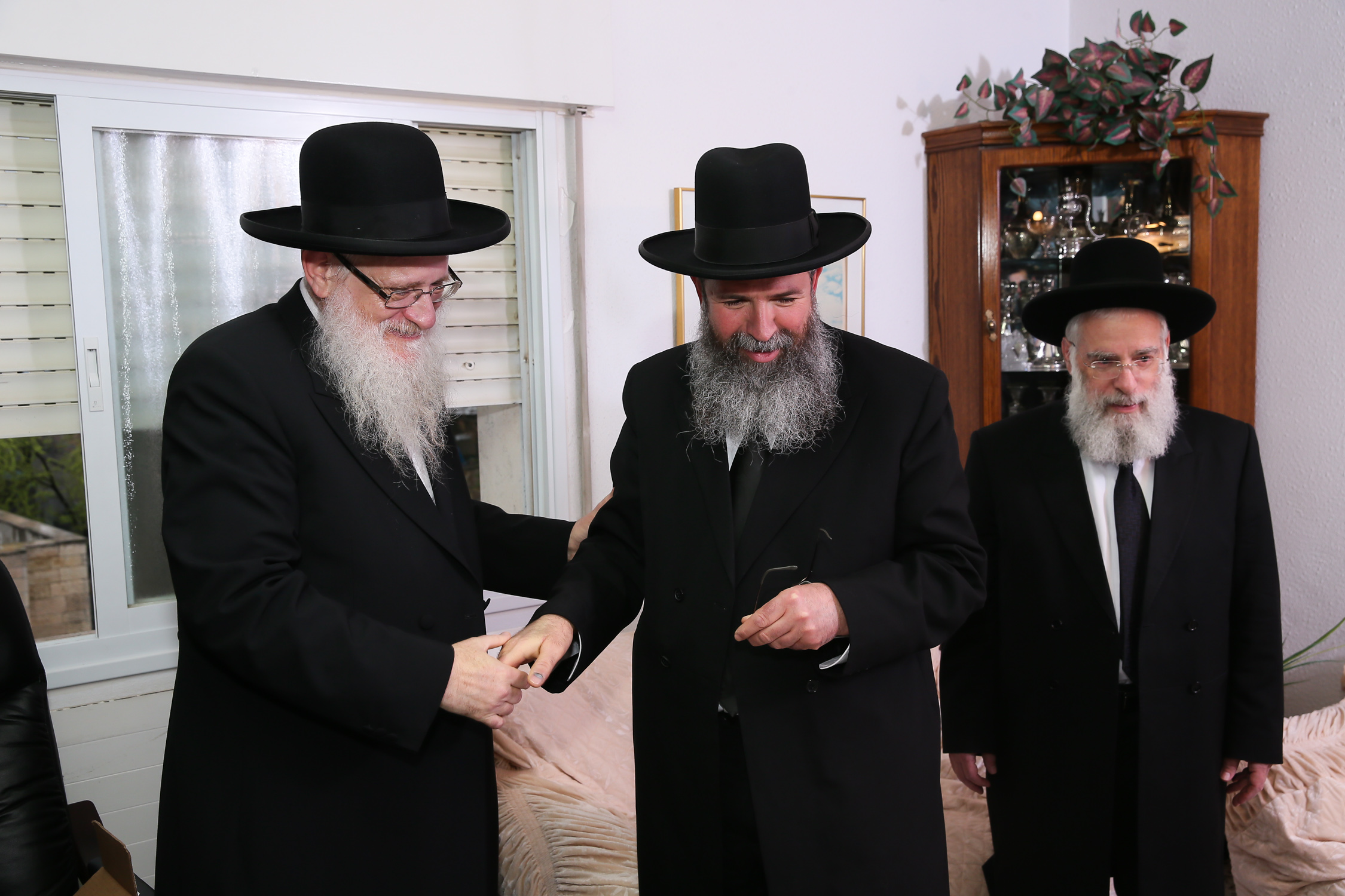 ישיבת מרכז הרב. הרב יגאל לרר יחד עם הרב יעקב שפירא והרב יהושע מגנס